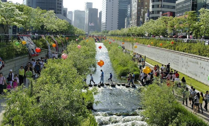 Hi Seoul' 2008. Spring. 2nd day